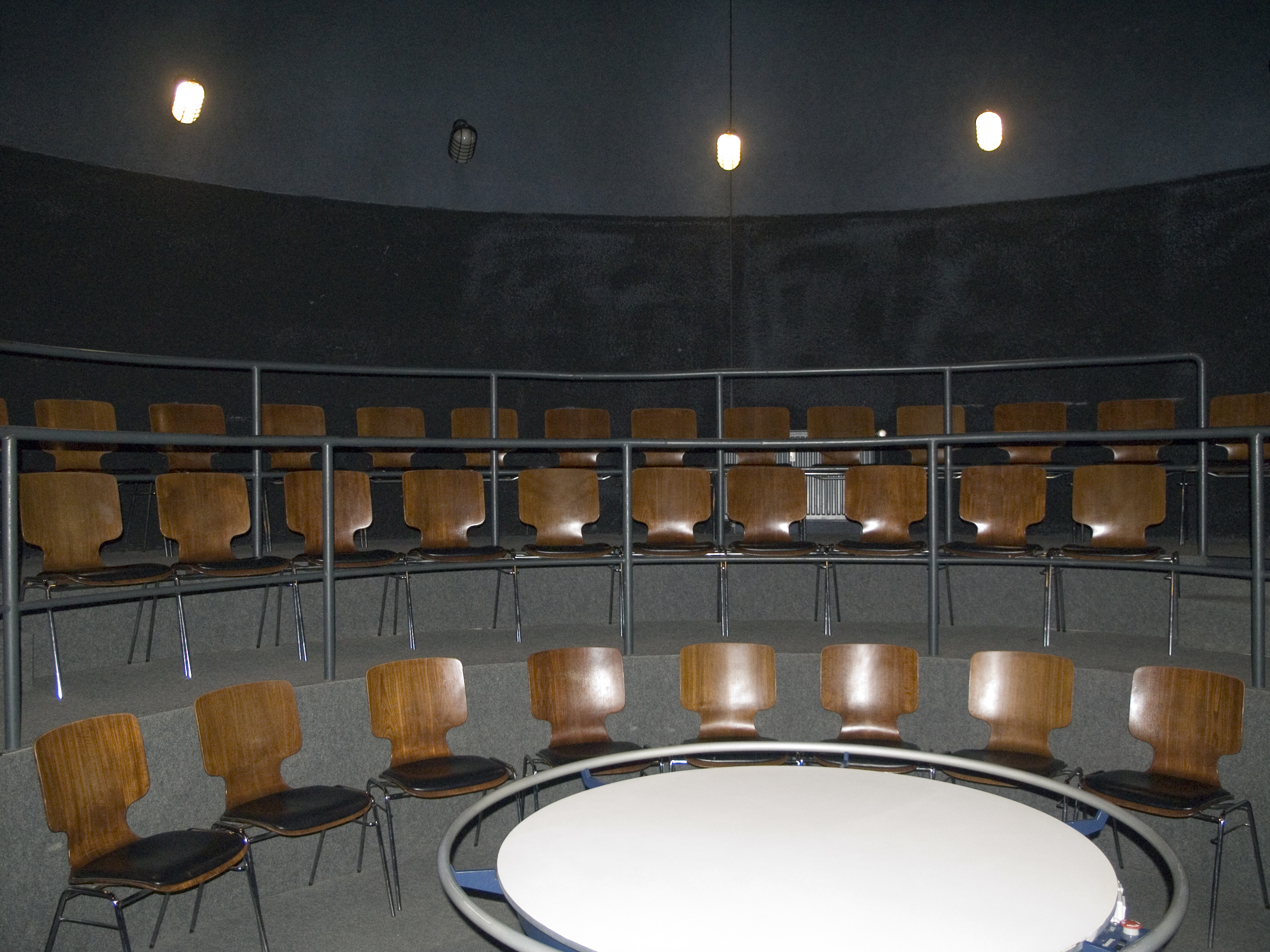 Северный Рейн-Вестфалия, г. Мюльхайм-на-Руре - камера-обскура, демонстрационный зал